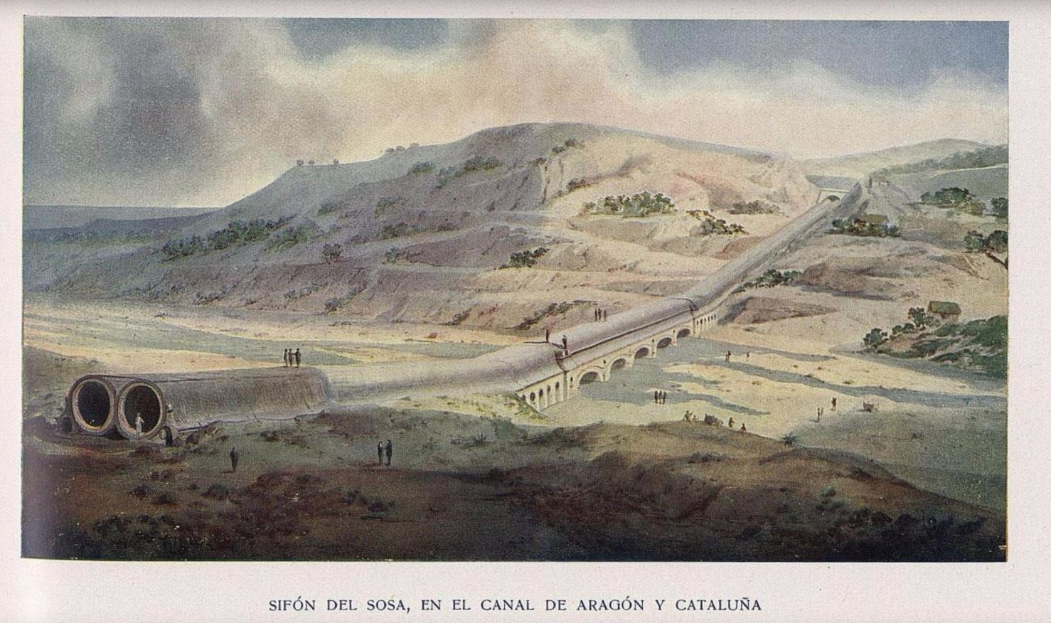 Sifón de Sosa según dibujo del catálogo de José Eugenio Ribera. Proyectado y ejecutado por el ingeniero de caminos José Eugenio Ribera. Este sifón se inauguró el 3 de marzo de 1906 por el rey Alfonso XIII y fue en su época el mayor sifón del mundo.